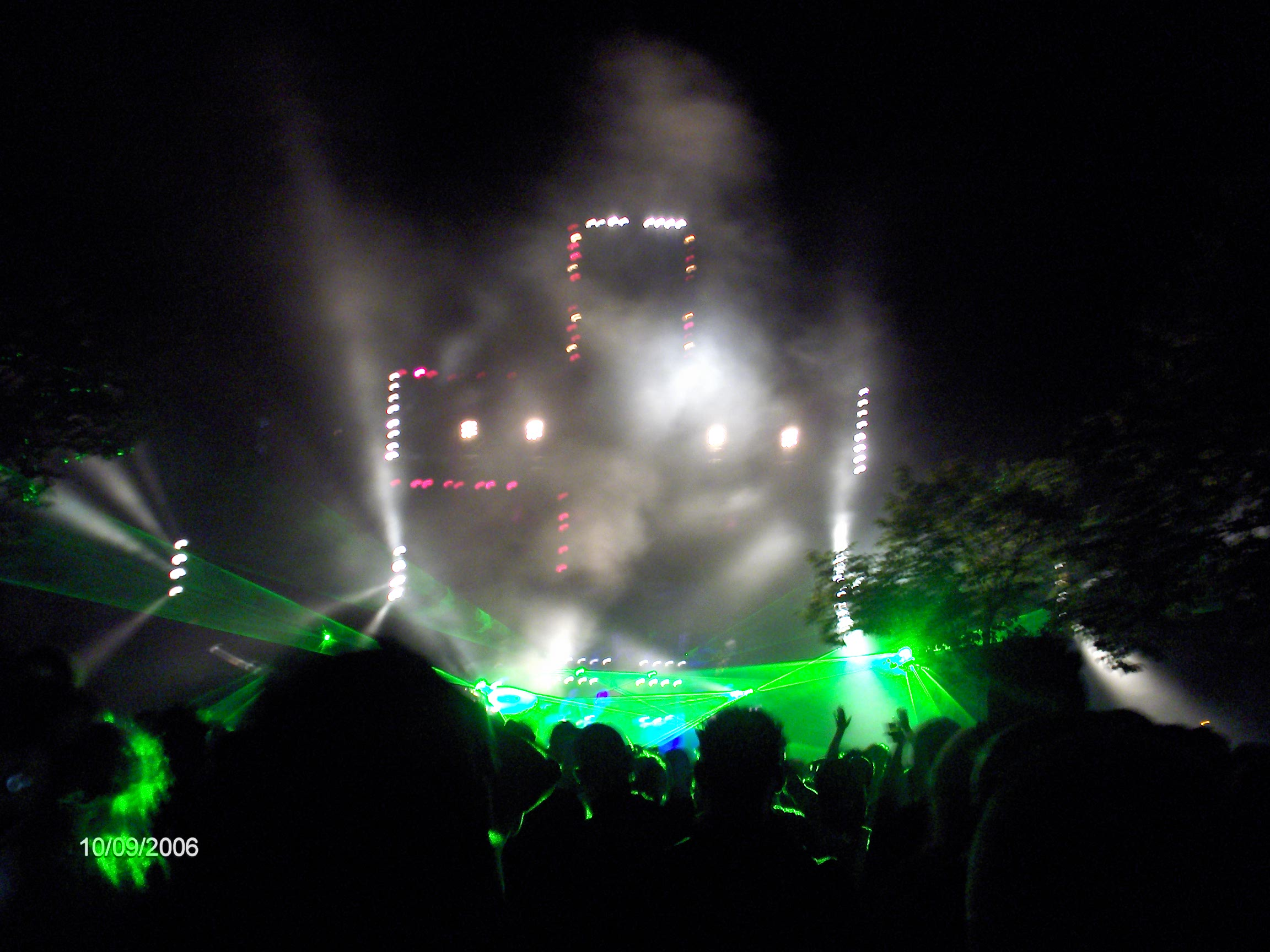 De welbesproken 'brandende' kruizen op A Nightmare Outdoor 2006.